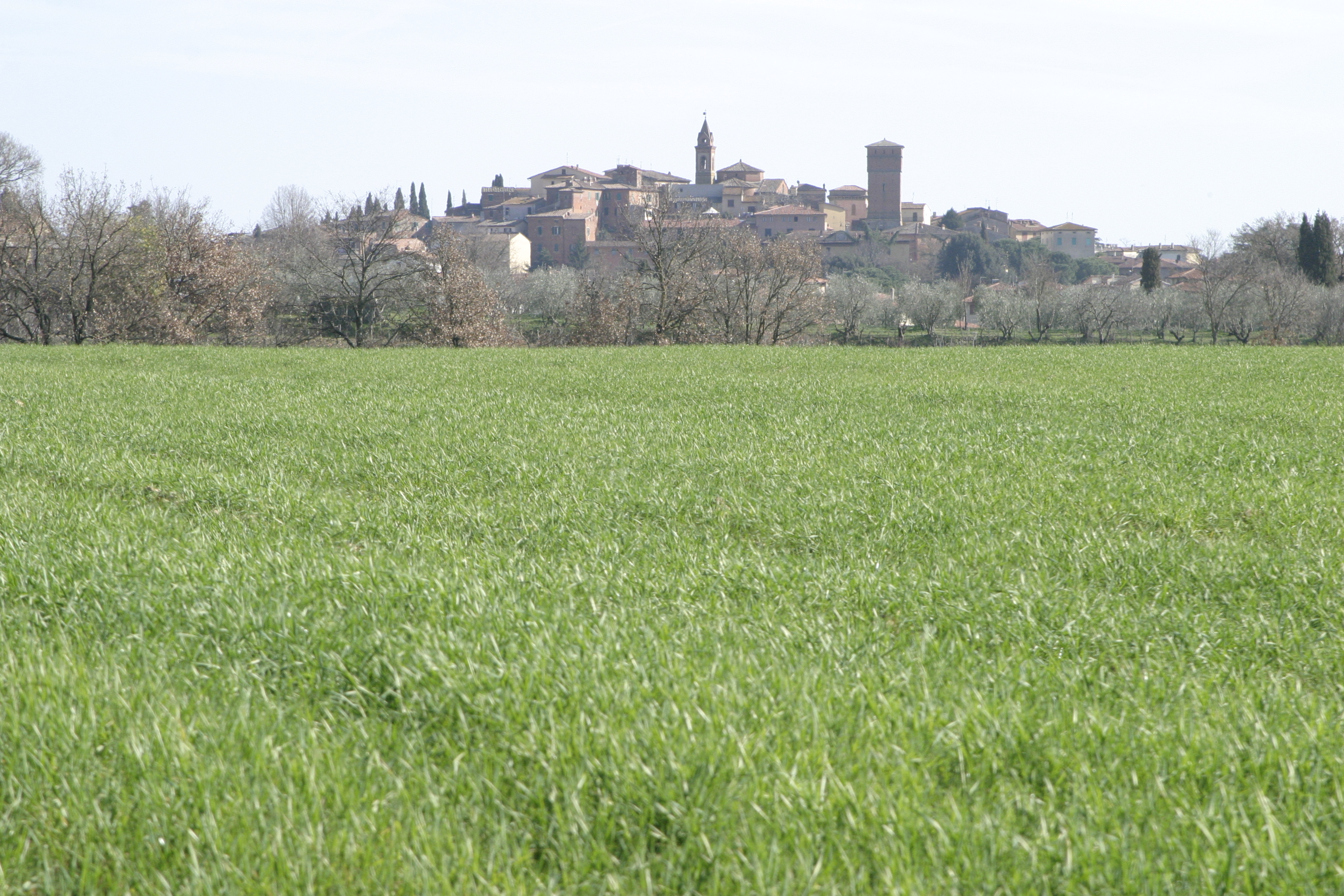 Panorama of Bettolle (Sinalunga, Siena, Tuscany, Italy)